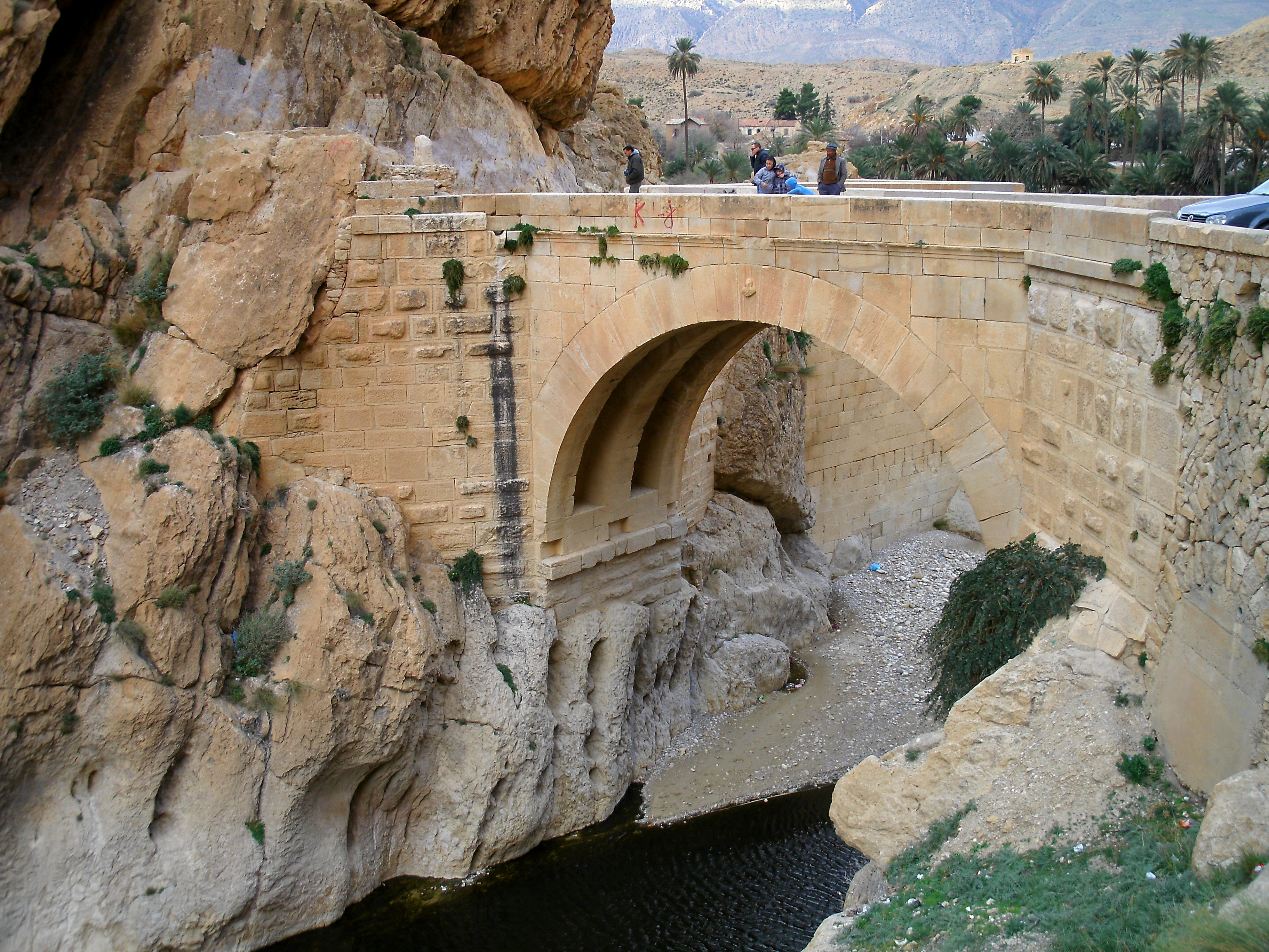 Le pont romain à El Kantara, Algeria.